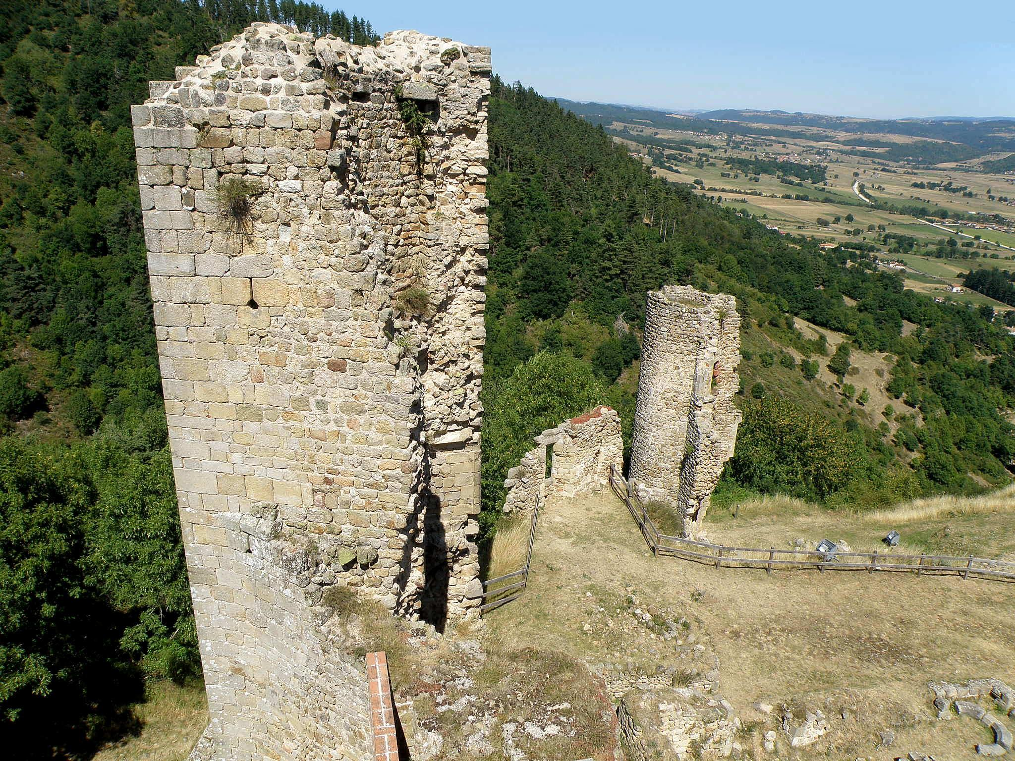 Château de Rochebaron, sis dans la commune de Bas-en-Basset, dép. de la Haute-Loire, France (région Auvergne). Tour triangulaire (à gauche), et tour d'angle nord (à droite) de la muraille d'enceinte du château proprement dit. La tour triangulaire, dont l'arête nord-est (à droite sur la photo) pourrait être un vestige d'une tour plus ancienne, fait partie du noyau central du château. Vue prise du sommet de la tour circulaire ; coup d'oeil vers le nord-est. Dans la plaine au loin à droite : route vers Aurec-sur-Loire et hameau de Labiec (comm. de Bas-en-Basset).